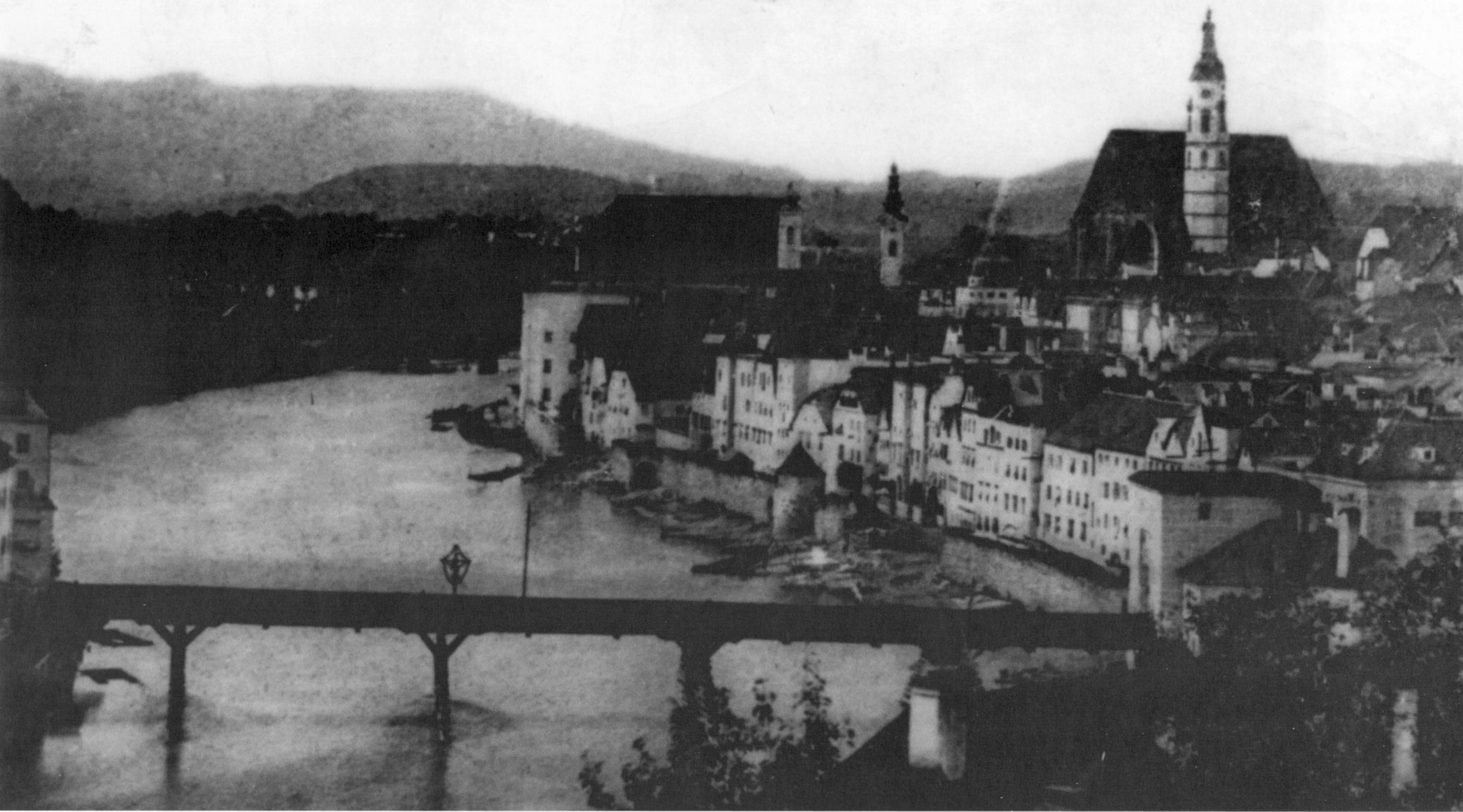 Blick auf Steyr vom Tabor im Jahr 1857. Von links nach rechts sind zu sehen: die hölzerne Ennsbrücke (bis 1864), die Stadtmauer (bis 1857), das Ennstor (bis 1864). Der barocke Turm der Stadtpfarrkirche rechts oben brannte 1876 aus und wurde neugotisch wieder aufgebaut. Die Abbrucharbeiten der Stadtmauer haben zum Zeitpunkt der Aufnahme bereits begonnen